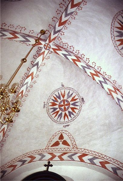 Linnerup kirke ligger i Linnerup Sogn, i det tidligere Vrads Herred Skanderborg Amt, nuværende Hedensted Kommune, Region Midtjylland. Kirken var muligvis viet til Sankt Peter i middelalderen. Kirken blev opført i romansk tid med blev næsten nybygget i forbindelse med en restaurering i 1866, d